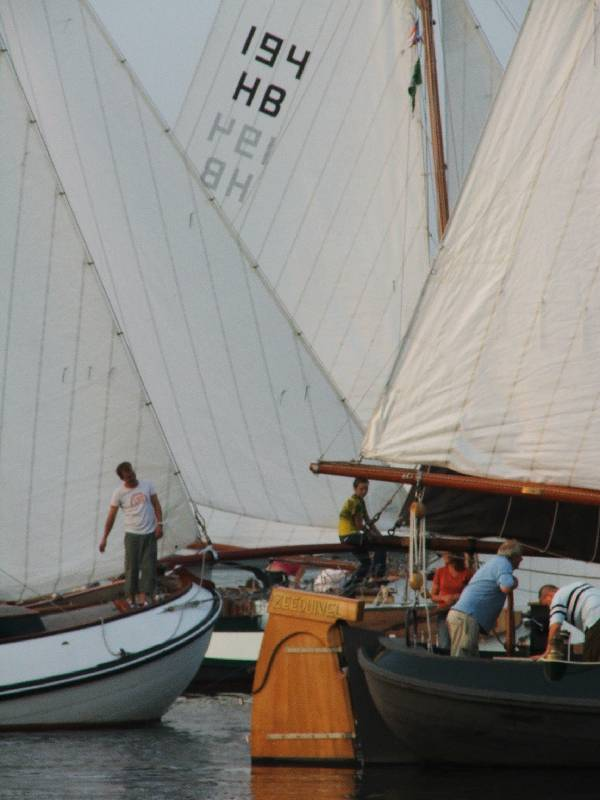 Schippers in duel tijdens de Darp platbodem competitie.